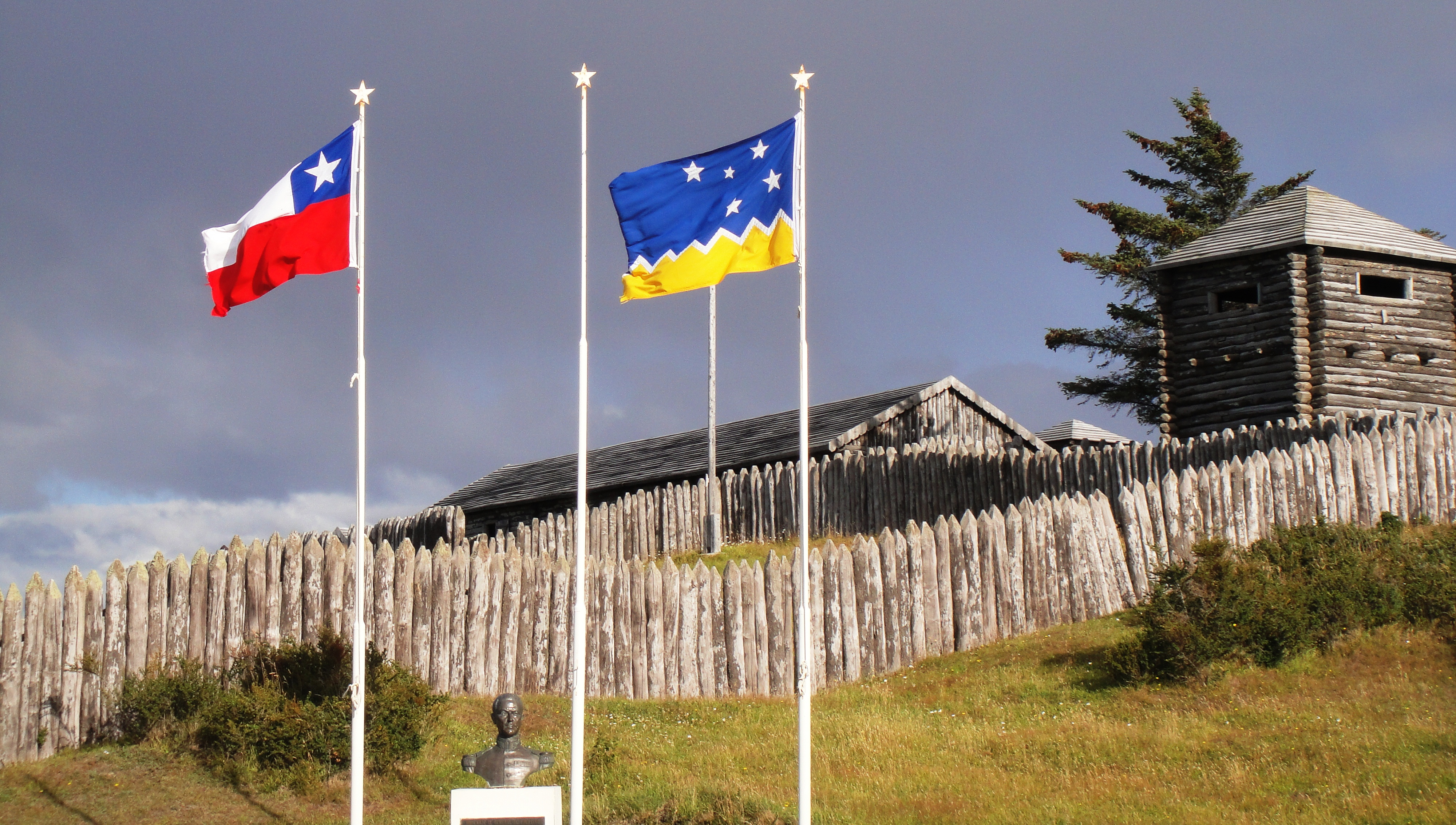 Entrada a Fuerte Bulnes